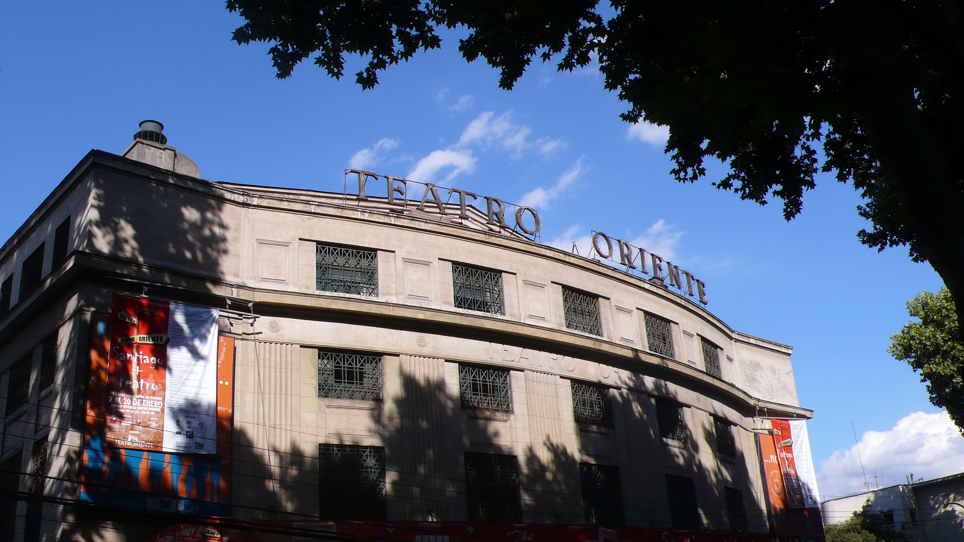 Teatro Oriente, avenida Pedro de Valdivia 99